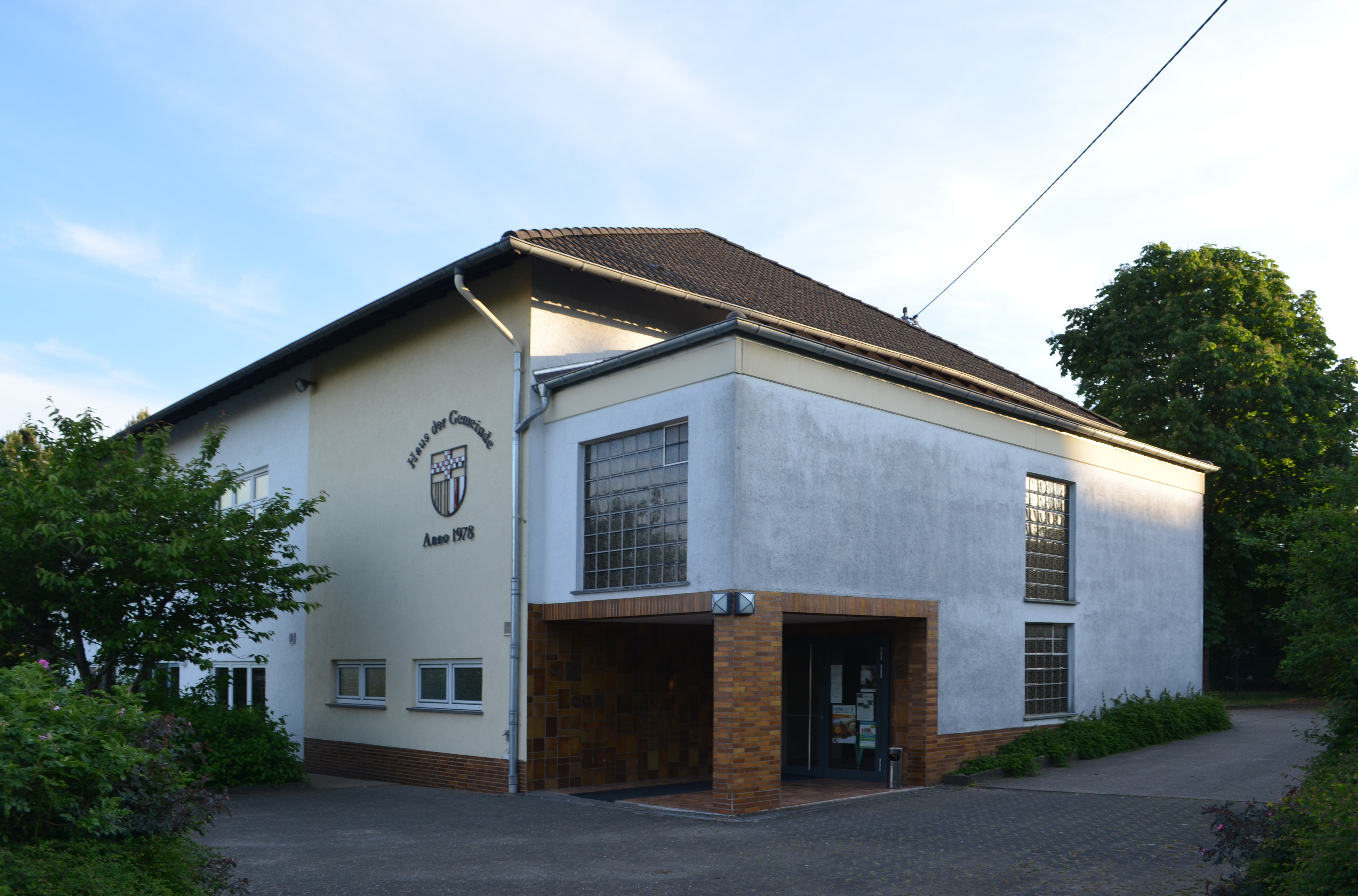 Daxweiler, Haus der Gemeinde